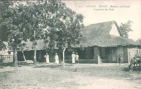 Ségou, mission catholique, logement des Pères.